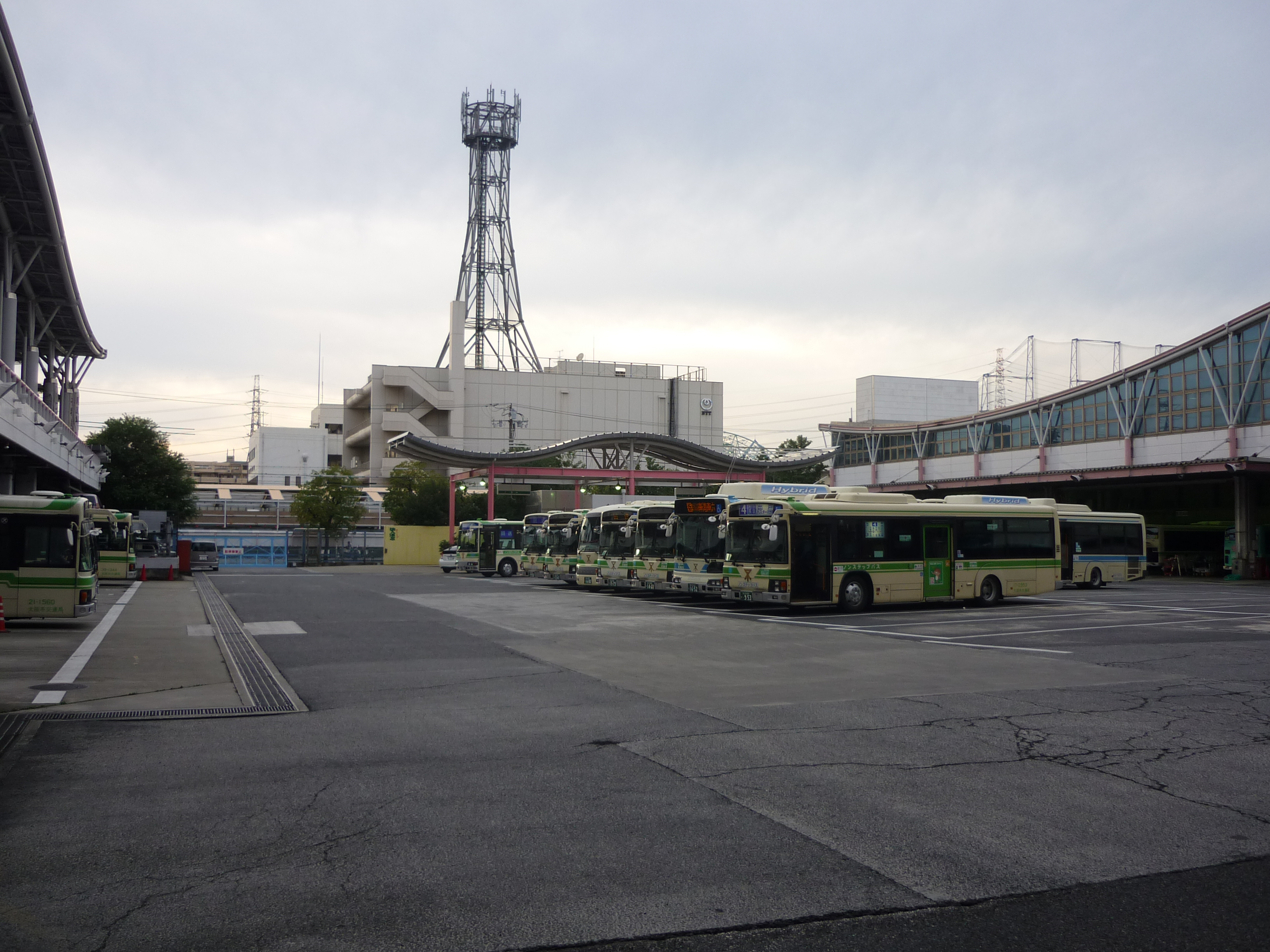 大阪市営バス住之江営業所